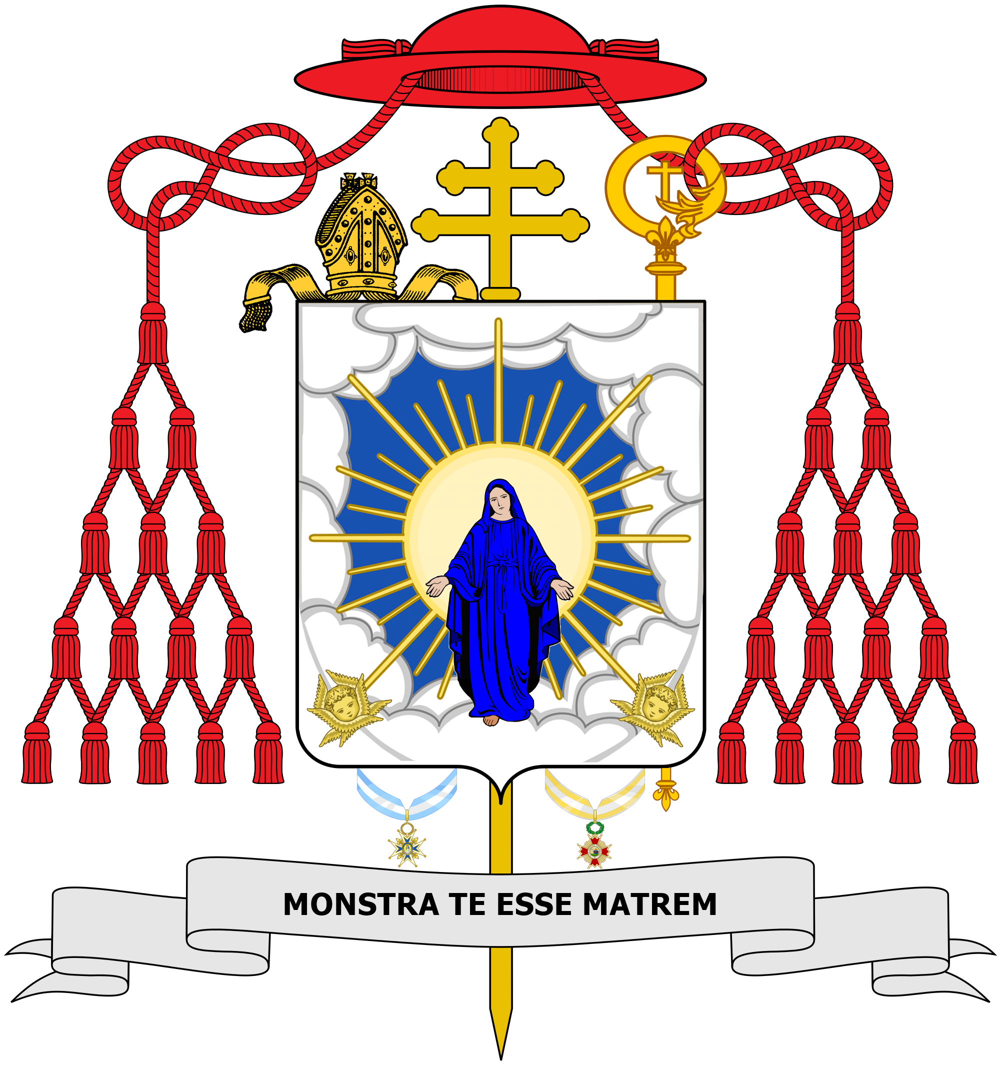 Escudo utilizado por Antolín Cardenal Monescillo y Viso, arzobispo de Valencia y de Toledo.